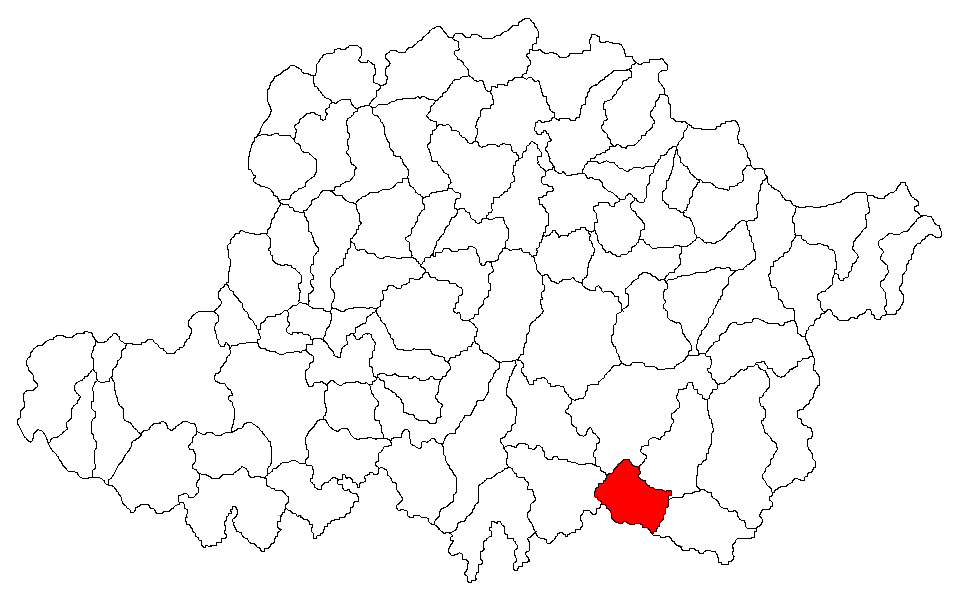 Categorie:Hărţi ale judeţului Arad